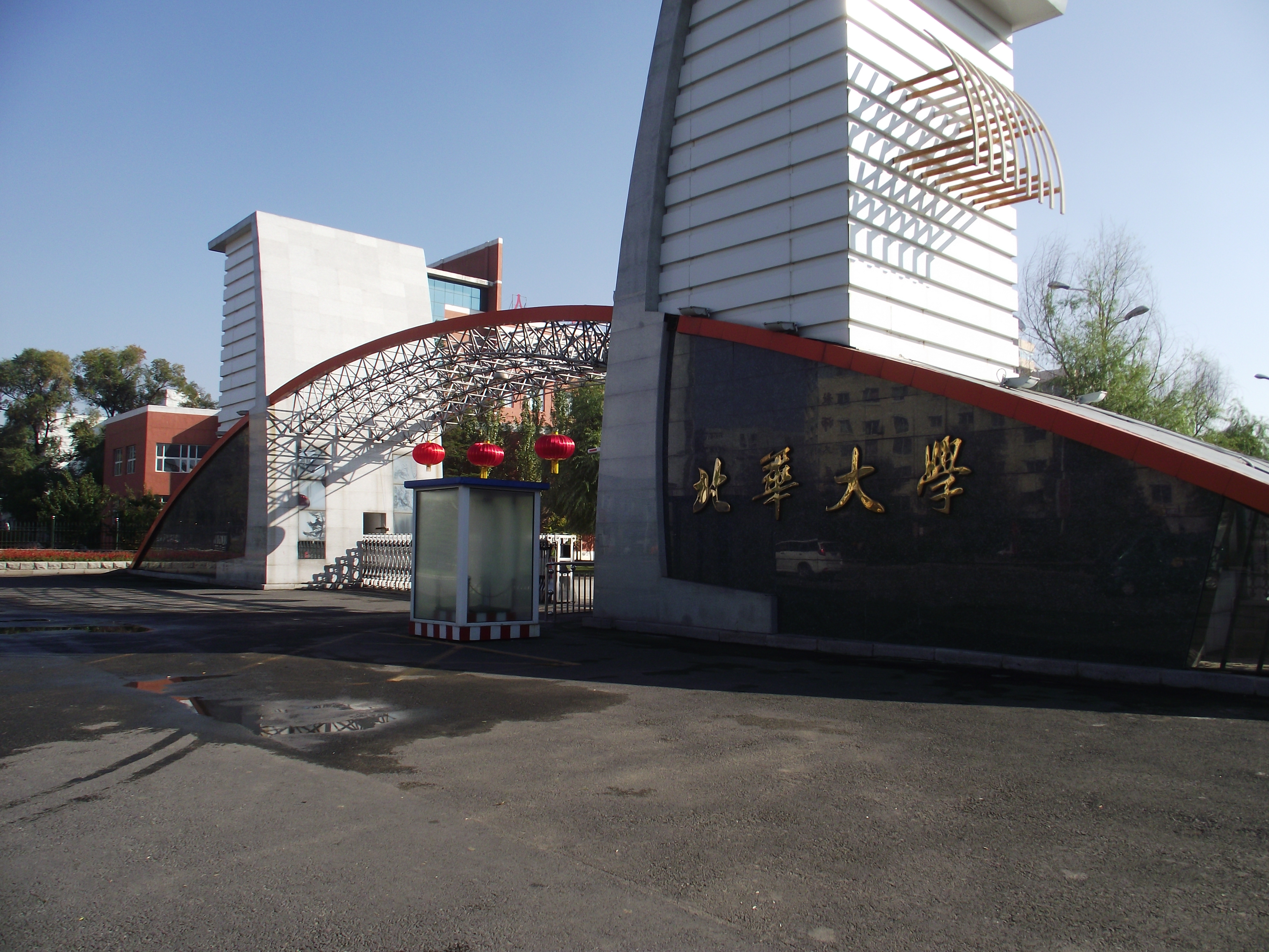 北华大学DSCF0092